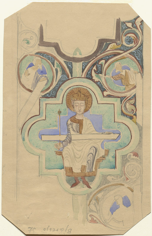 Kalkmålning i korets tunnvalv. Gammaltestamentlig kung, troligen David, detalj av scen med Jesu släktträd (Jesse rot). Akvarell av Nils Månsson Mandelgren, från 1800-talets mitt. Motiv: Bjäresjö kyrka Kategori: (03) Kalkmålningar, AkvarellKalkmålning i korets tunnvalv. Gammaltestamentlig kung, troligen David, detalj av scen med Jesu släktträd (Jesse rot). Akvarell av Nils Månsson Mandelgren, från 1800-talets mitt.